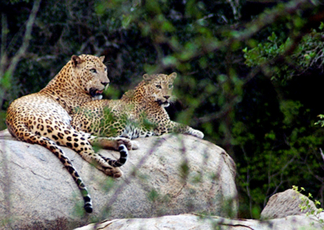 Lankan Leopard (Panthera pardus kotiya) Yala National Park, Sri Lanka